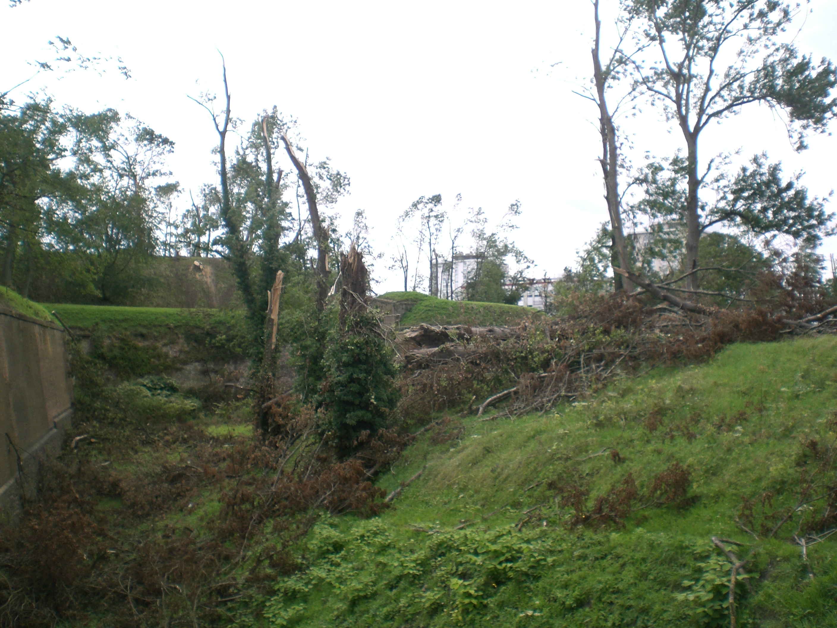 remparts de maubeuge après la tempete du 03 aout 2008